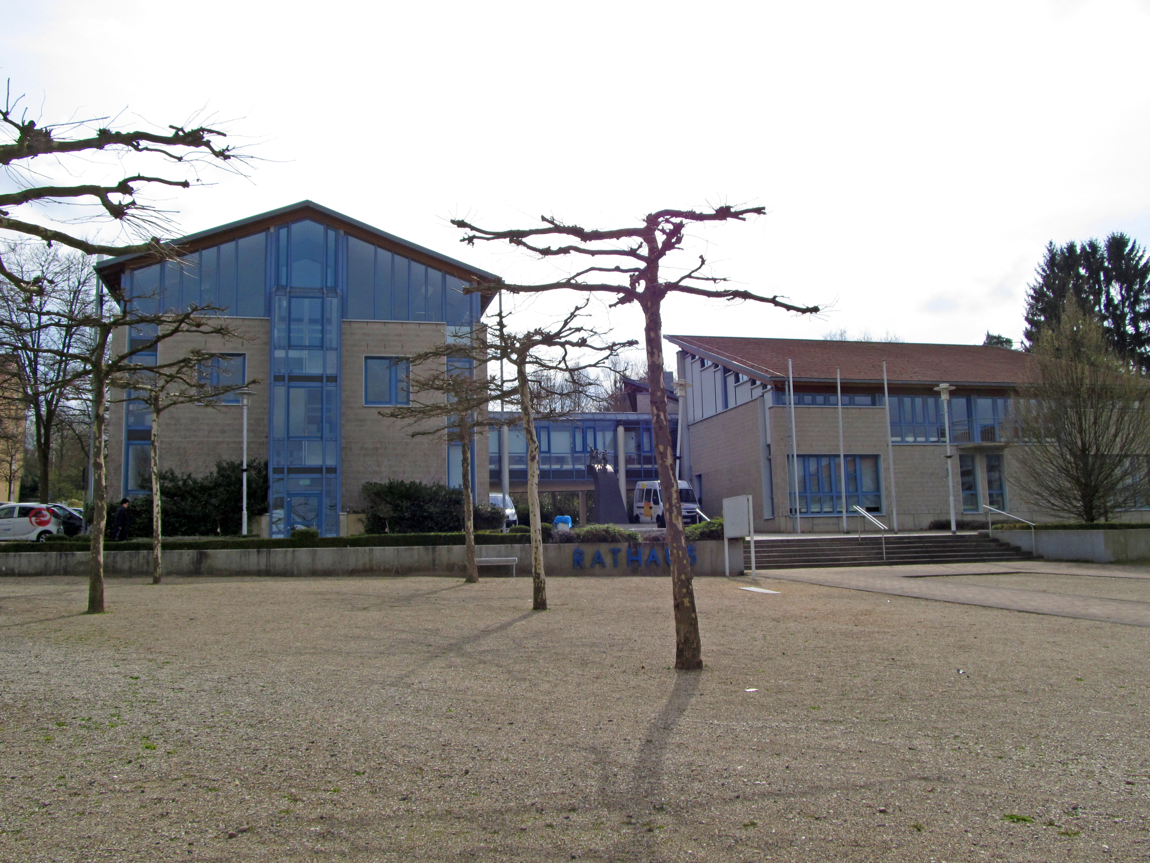 Rathaus von Riegelsberg, Regionalverband Saarbrücken, Saarland